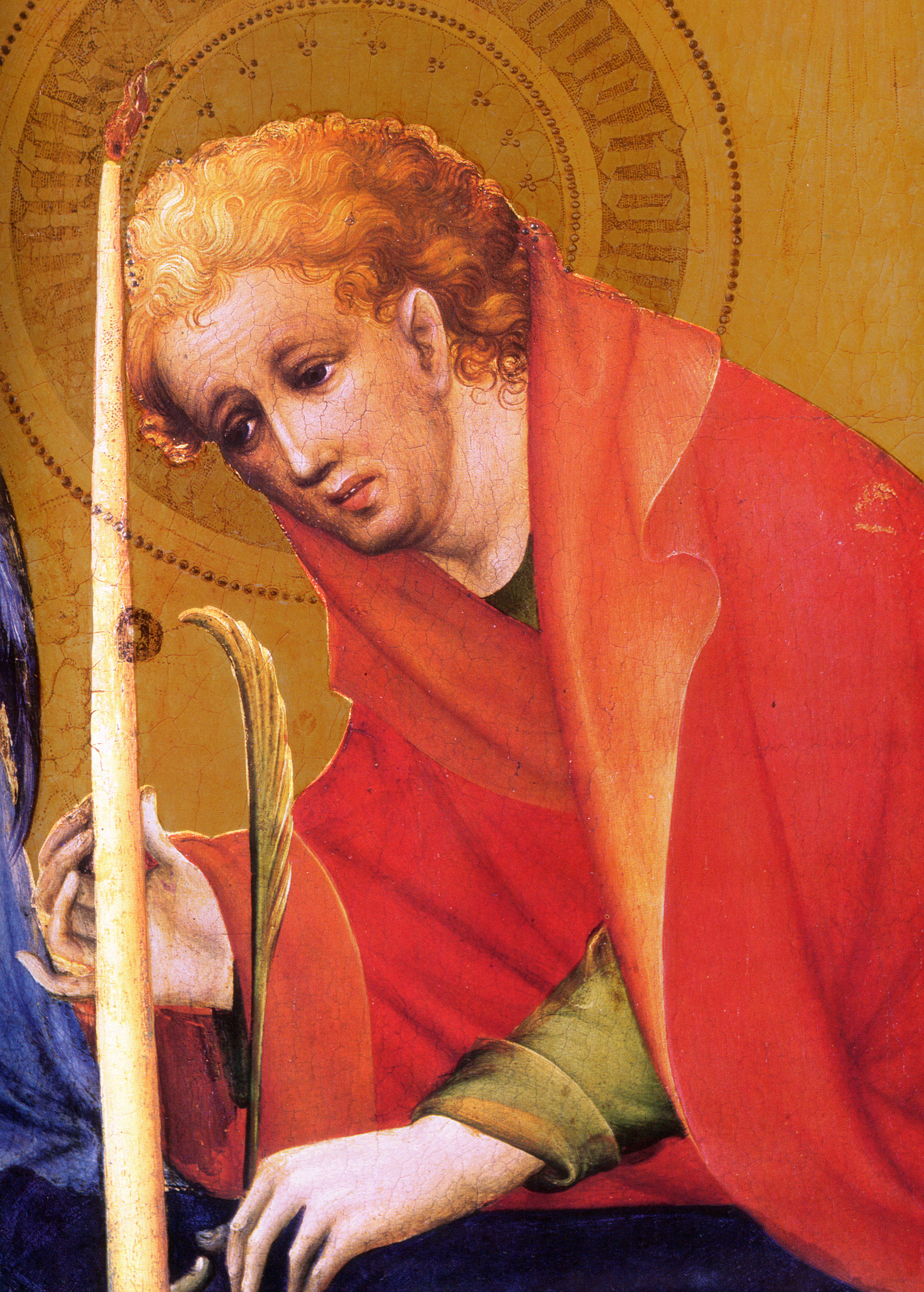 Dortmund, Marienkirche, Konrad von Soest, Marienaltar, mittlere Tafel, Johannes